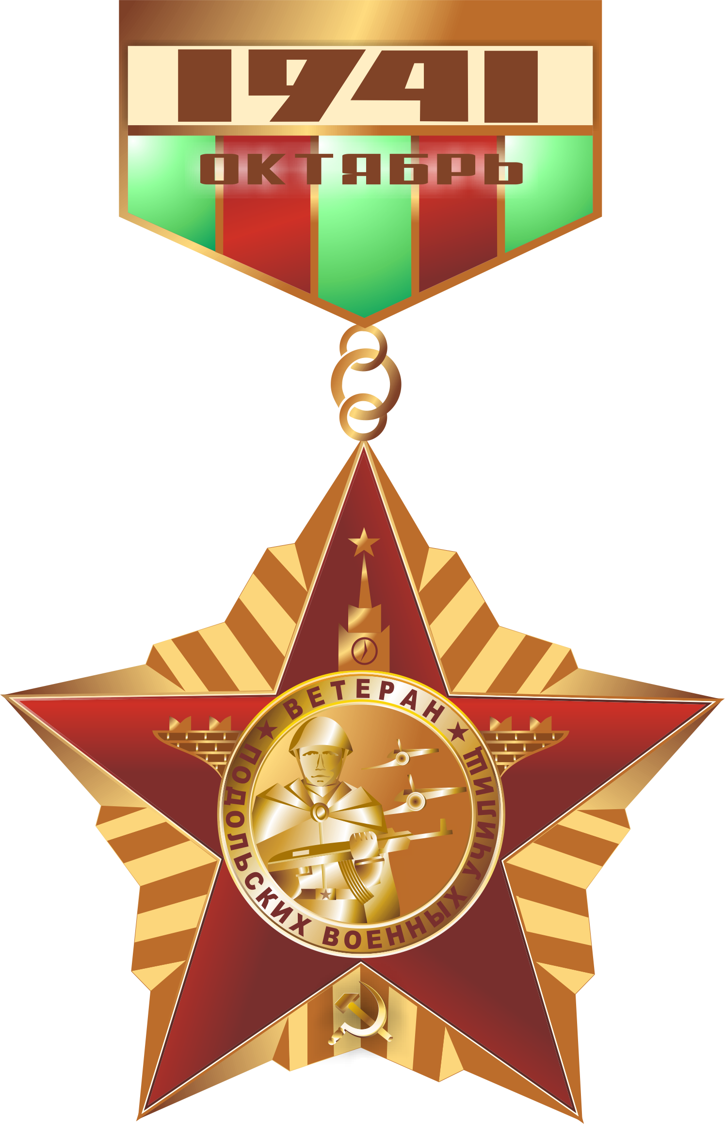 Памятный знак "Ветеран Подольских военных училищ. Октябрь 1941 г."